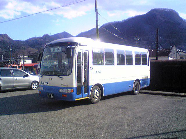 下仁田駅で撮影。